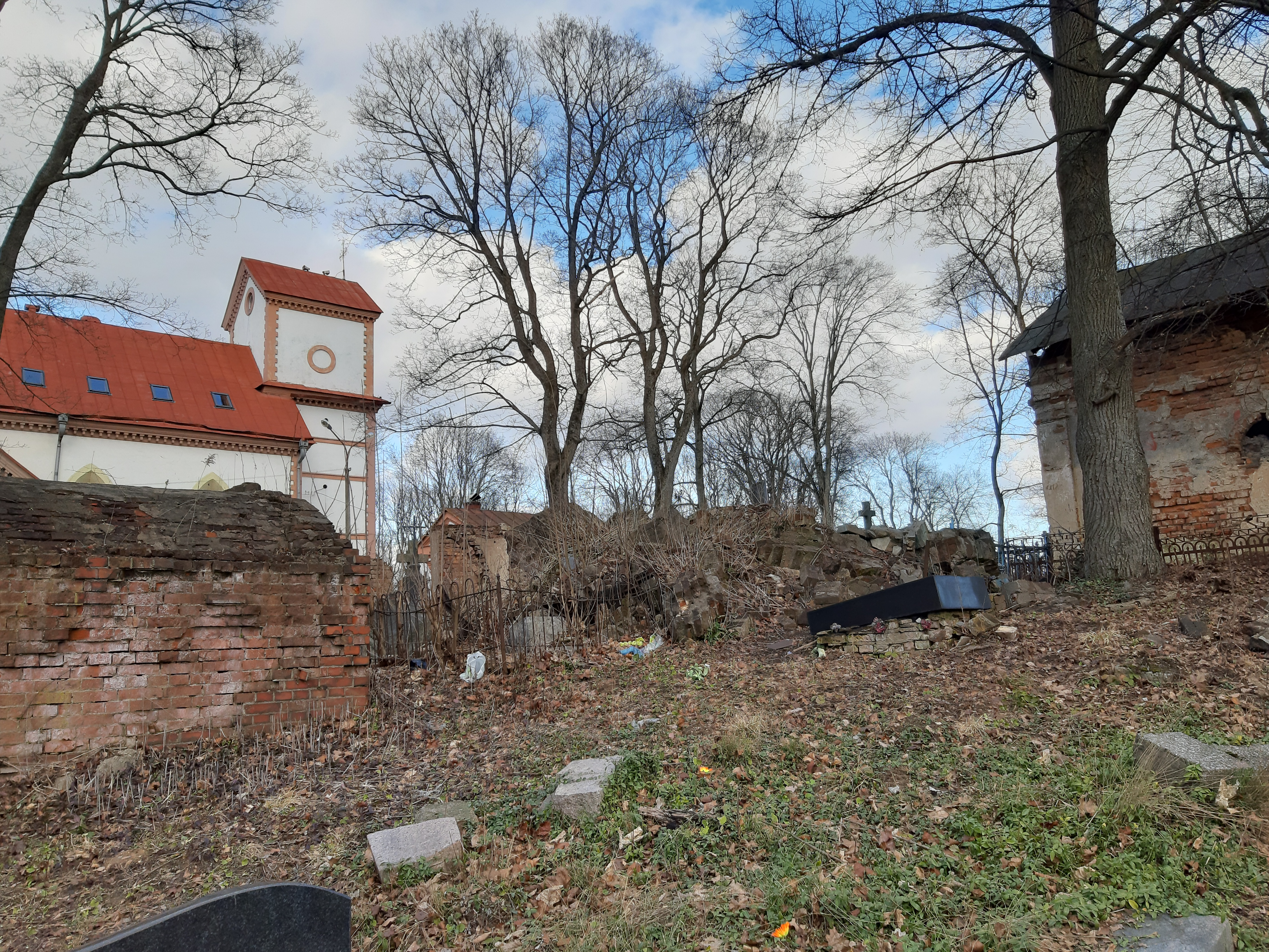 Мінск. Кальварыйскія могілкі. 2020